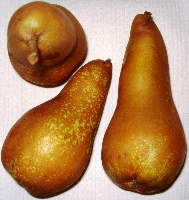 Birnen der Sorte "Abbe Fetel" - "Abate Fetel"